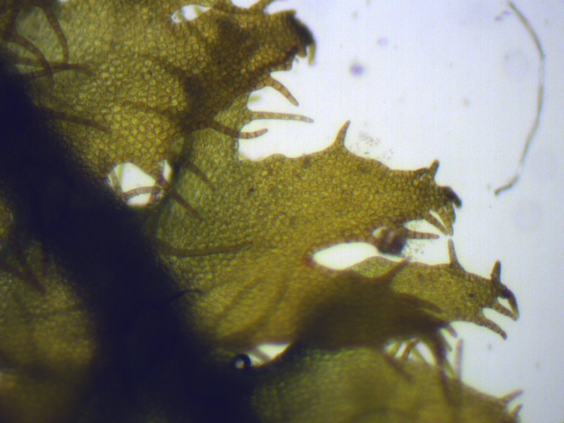 Behaartes Federchen-Lebermoos (Ptilidium ciliare), Blättchen bei 40x, Rostock